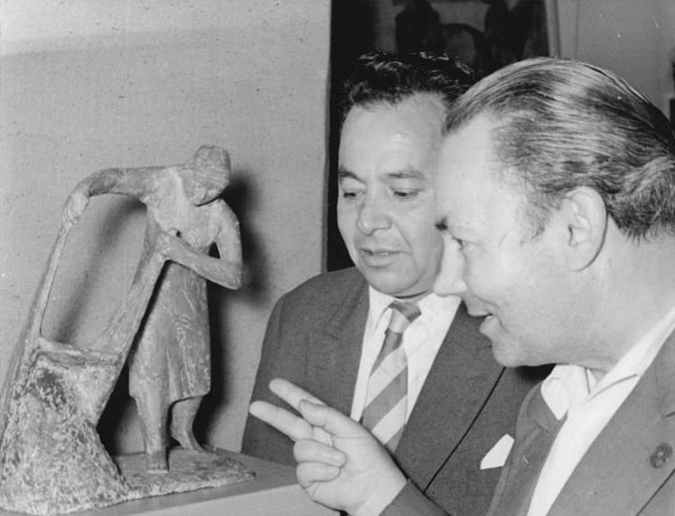 Zentralbild Hochneder 6.6.1960 II. Arbeiterfestspiele des FDGB im Bezirk Karl-Marx-Stadt. Am 4.6.1960 wurde im Städtischen Museum Karl-Marx-Stadt am Schloßplatz die Kunstausstellung mit über 1.600 Werken bildender Künstler und Laienschaffenden anläßlich der II. Arbeiterfestspiele eröffnet, die die neuen sozialistischen Beziehungen zwischen Berufs- und Laienkünstlern in der DDR zum Ausdruck bringt. UBz: Prof. Dr. Naptali Zuniga aus Ecuador betrachtet die Gipsplastik "Meine Verpflichtung" von dem freischaffenden Kunstler Vinzenz Wanitschke aus dem VEB Maschinenbau Lauchhammerwerk.